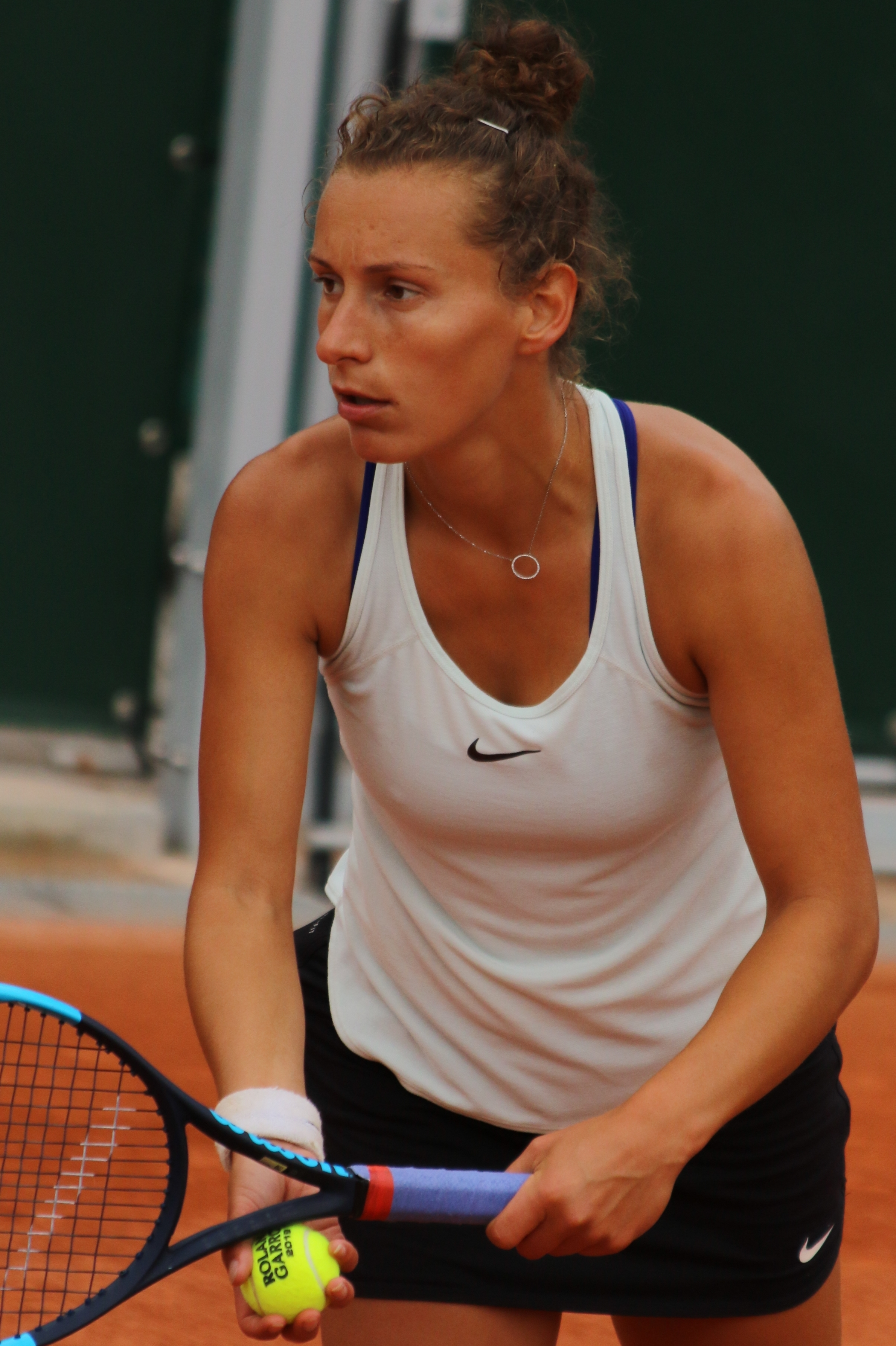 Lechemia RG19 (10)